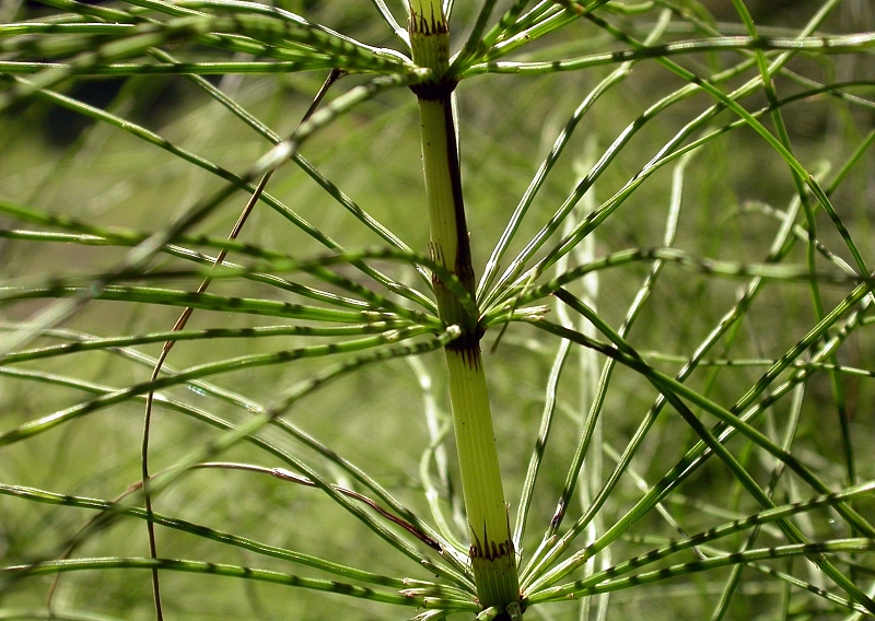 Riesen-Schachtelhalm Equisetum telmateia, Wutachschlucht, Schwarzwald, Deutschland, Germany